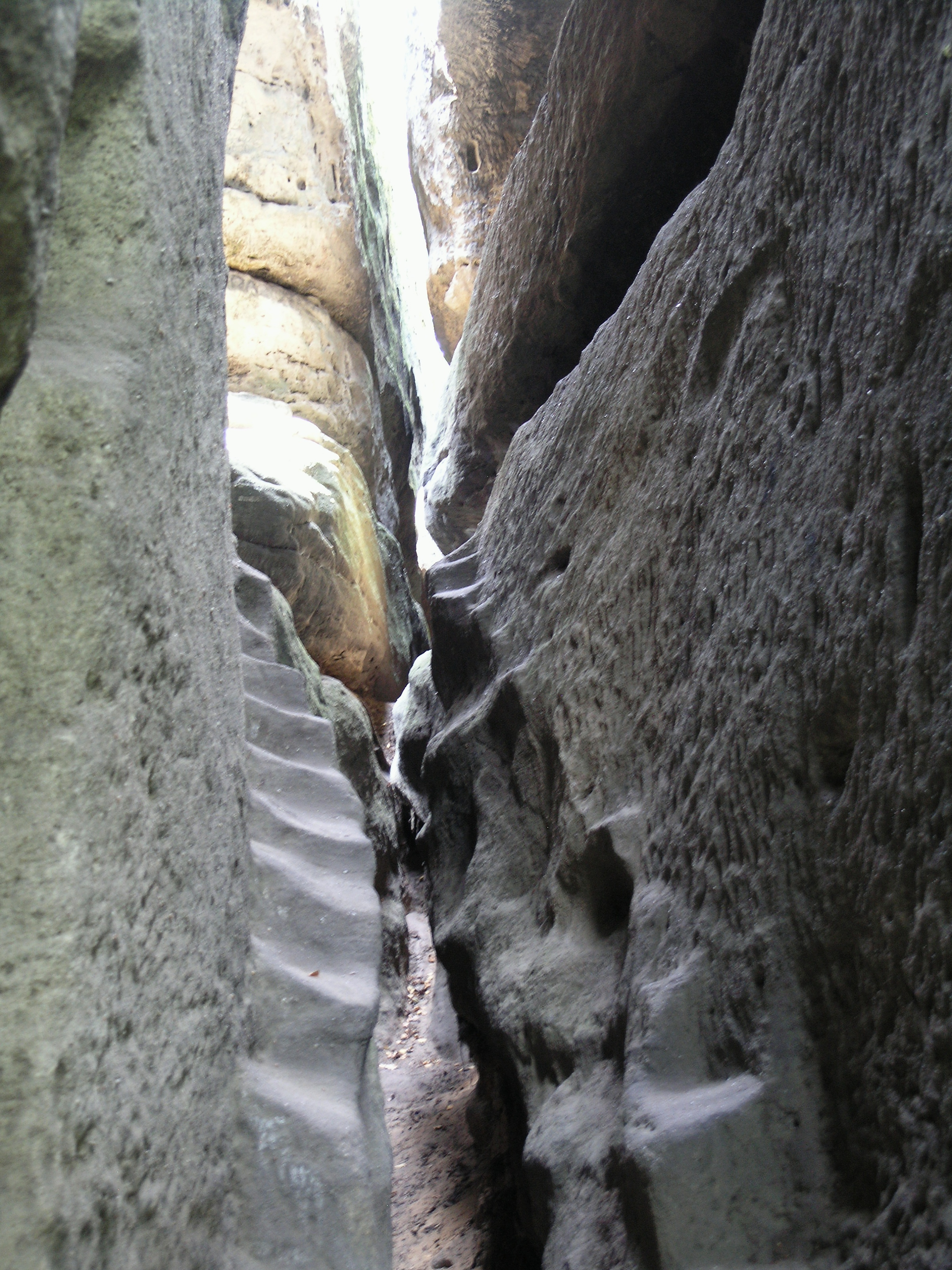 Nedamy - torzo schodiště Project: Chráněná území.